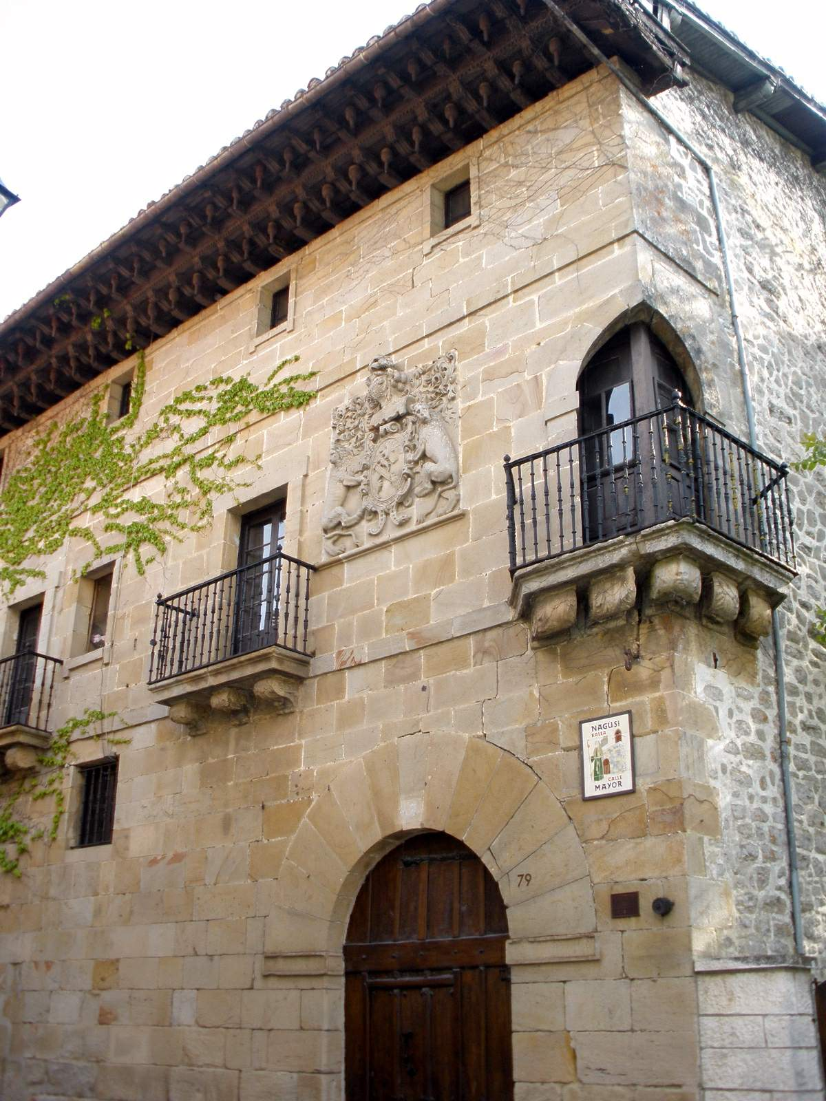 Casa Azkarraga, en Salvatierra-Agurain (Álava, País Vasco, España)